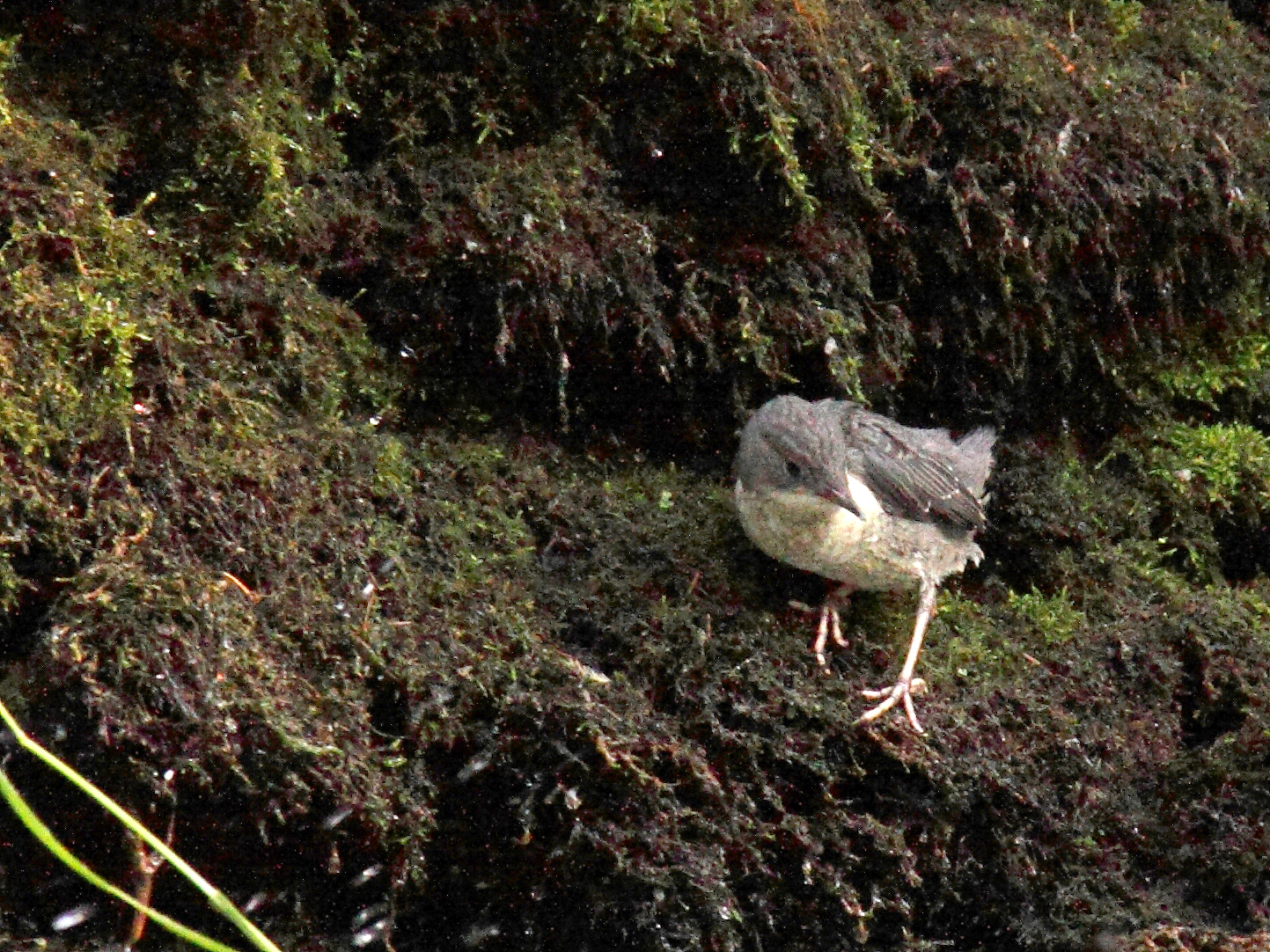 juvenil White-throated Dipper Wasseramsel Jungvogel NE-Slovakia, Slovak Paradise (Slovak: Slovenský raj) National Park, vic Cingov, ca. 600m asl., 24.06.2012 IMG_1164